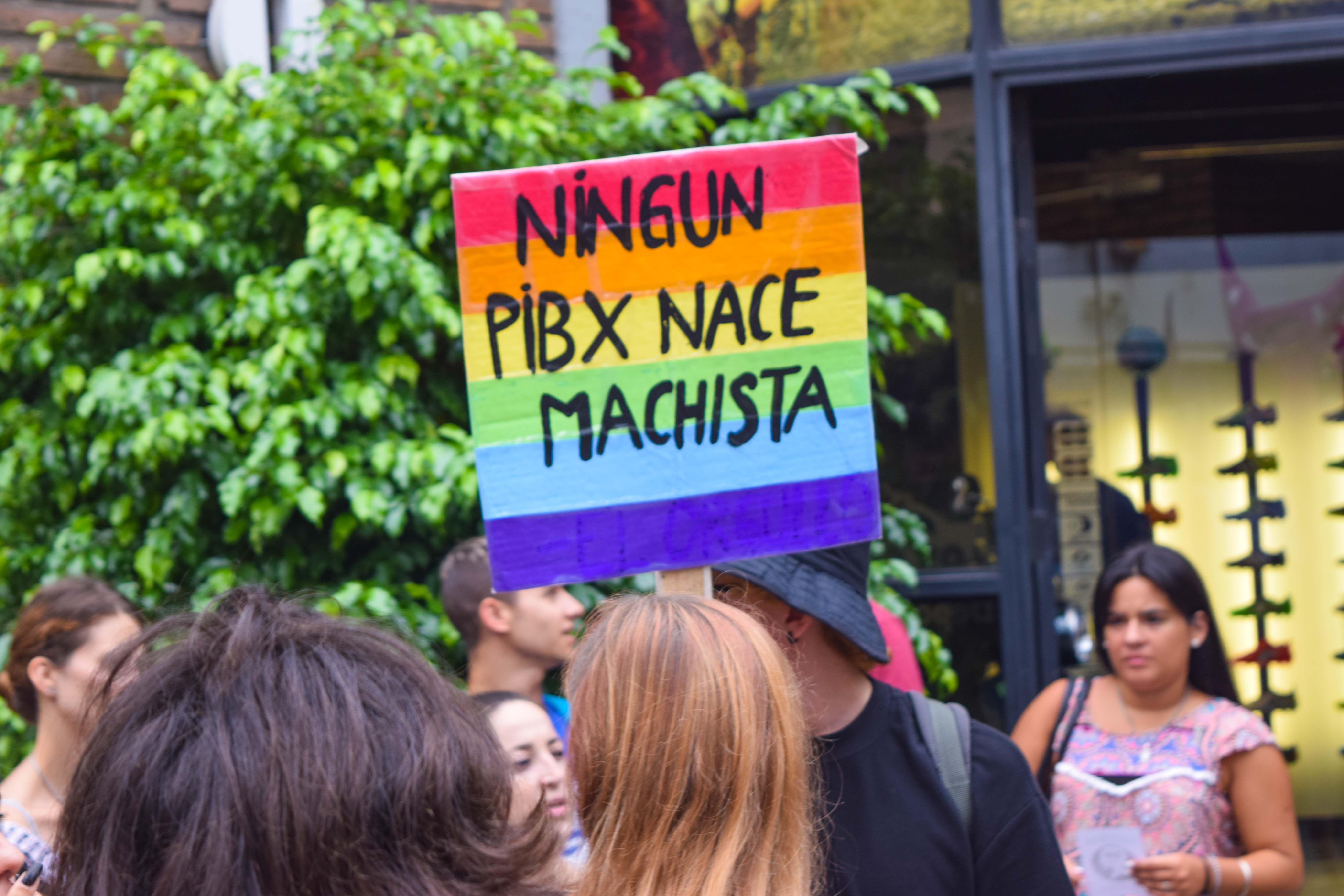 Paro Internacional de Mujeres en Santa Fe 2017 - Nosotras Paramos - 8M